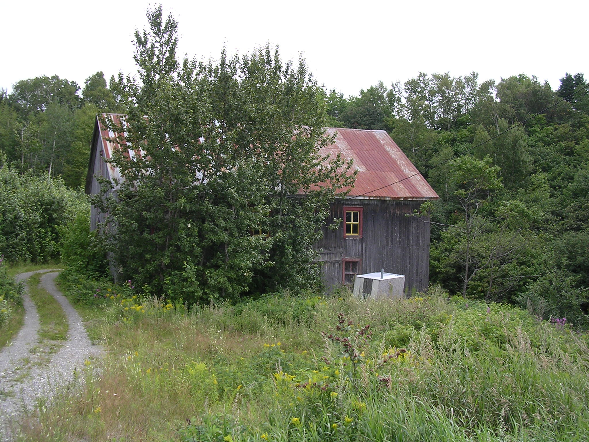 Moulin de Trois-Pistoles(Bas-Saint-Laurent, Québec). Moulin à eau; moulin à farine.